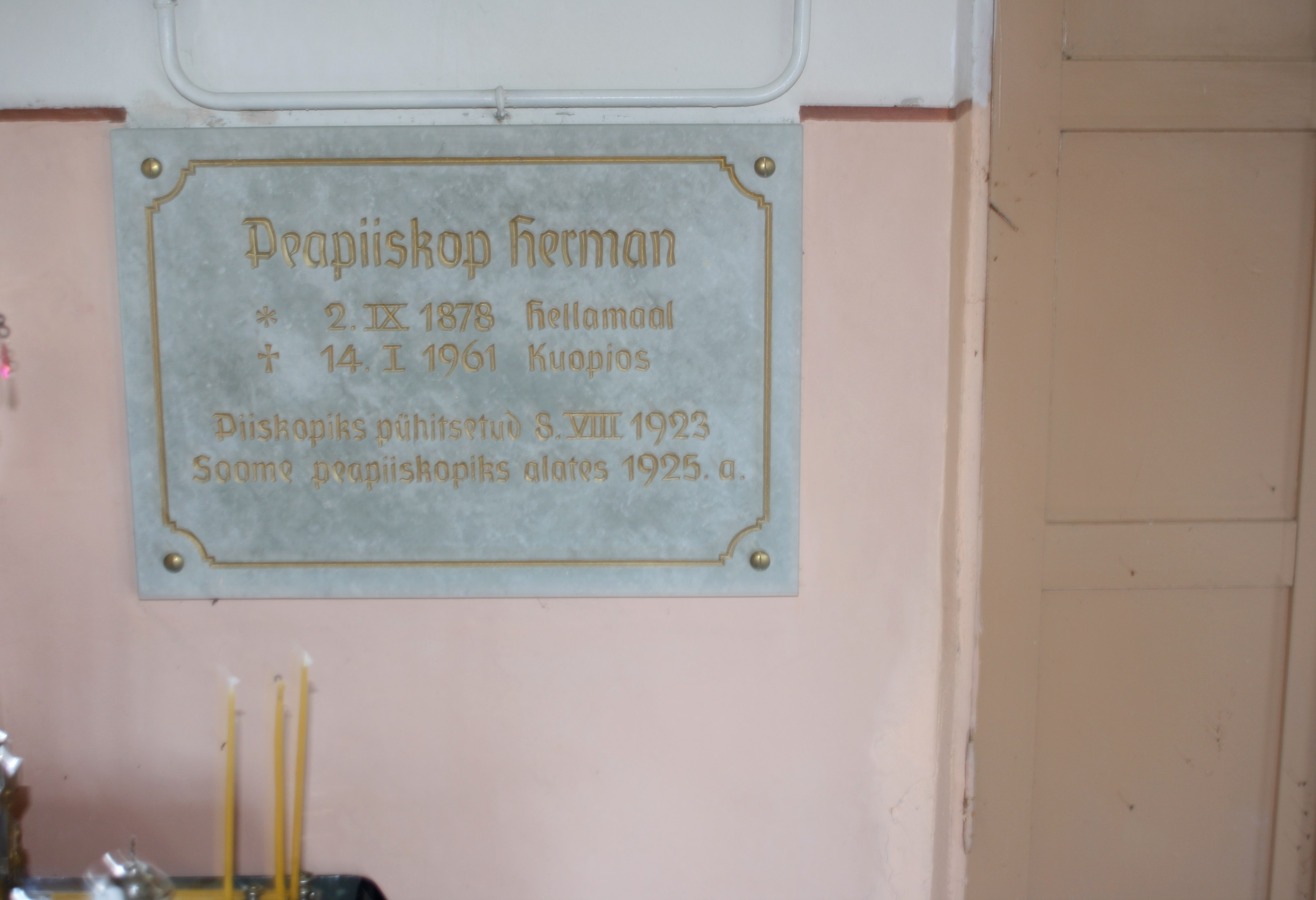 Peapiiskop Hermani mälestustahvel Hellamaal